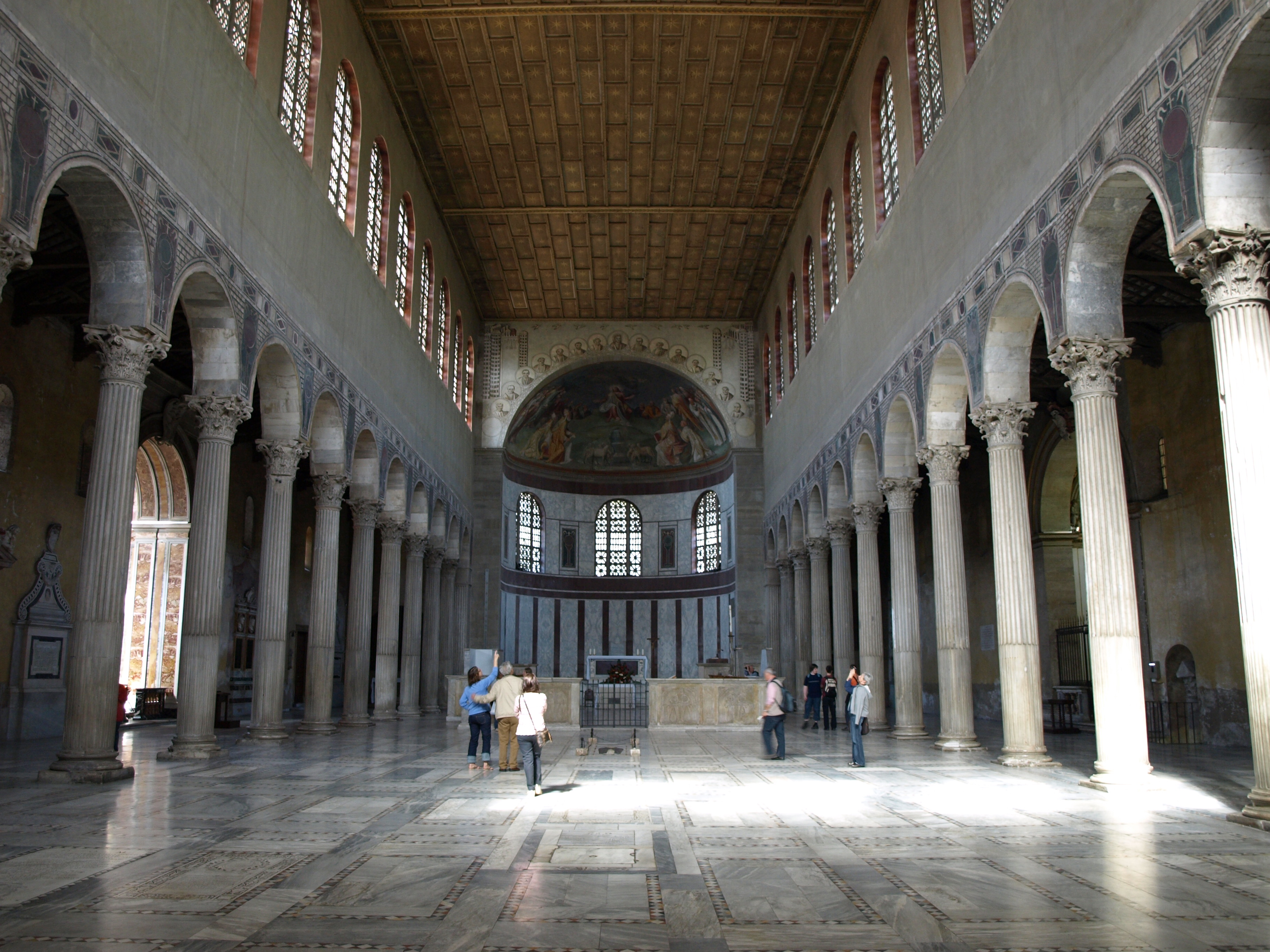 Basilika Santa Sabina (Rome)